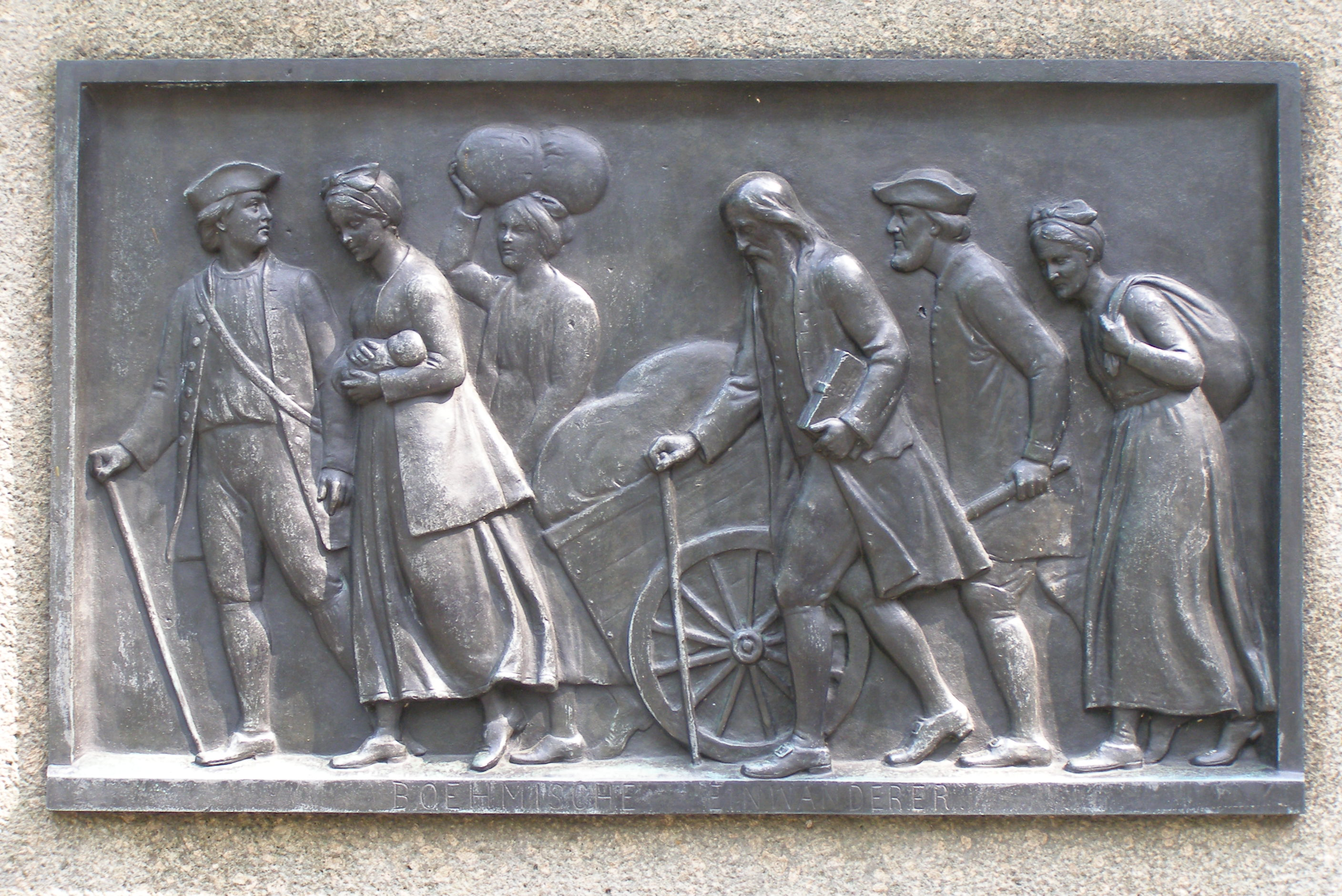 Ankunft der Böhmen in Rixdorf, Tafel an der Statue von Friedrich Wilhelm I., Böhmisch Rixdorf, Berlin